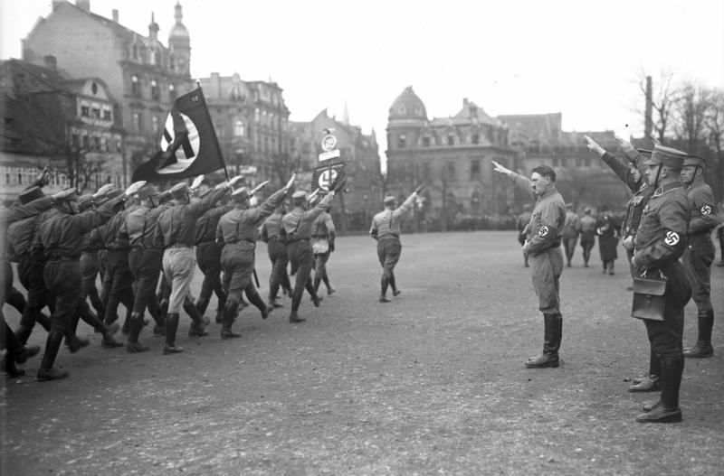 Das grosse Gautreffen der Nationalsozialisten vor ihrem Führer Adolf Hitler in Braunschweig!